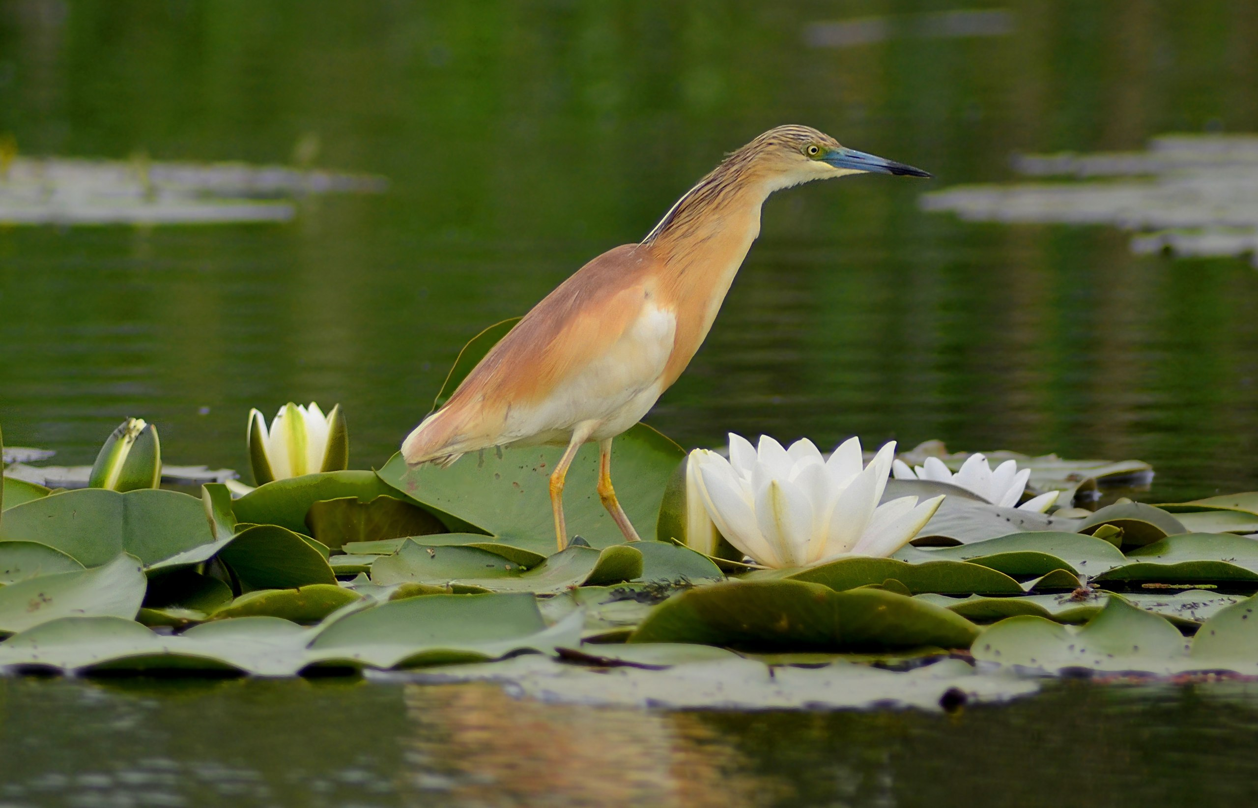 Дунайський біосферний заповідник, Кілійський р-н, м. Вилкове, вул. Татарбунарського повстання, 132 а